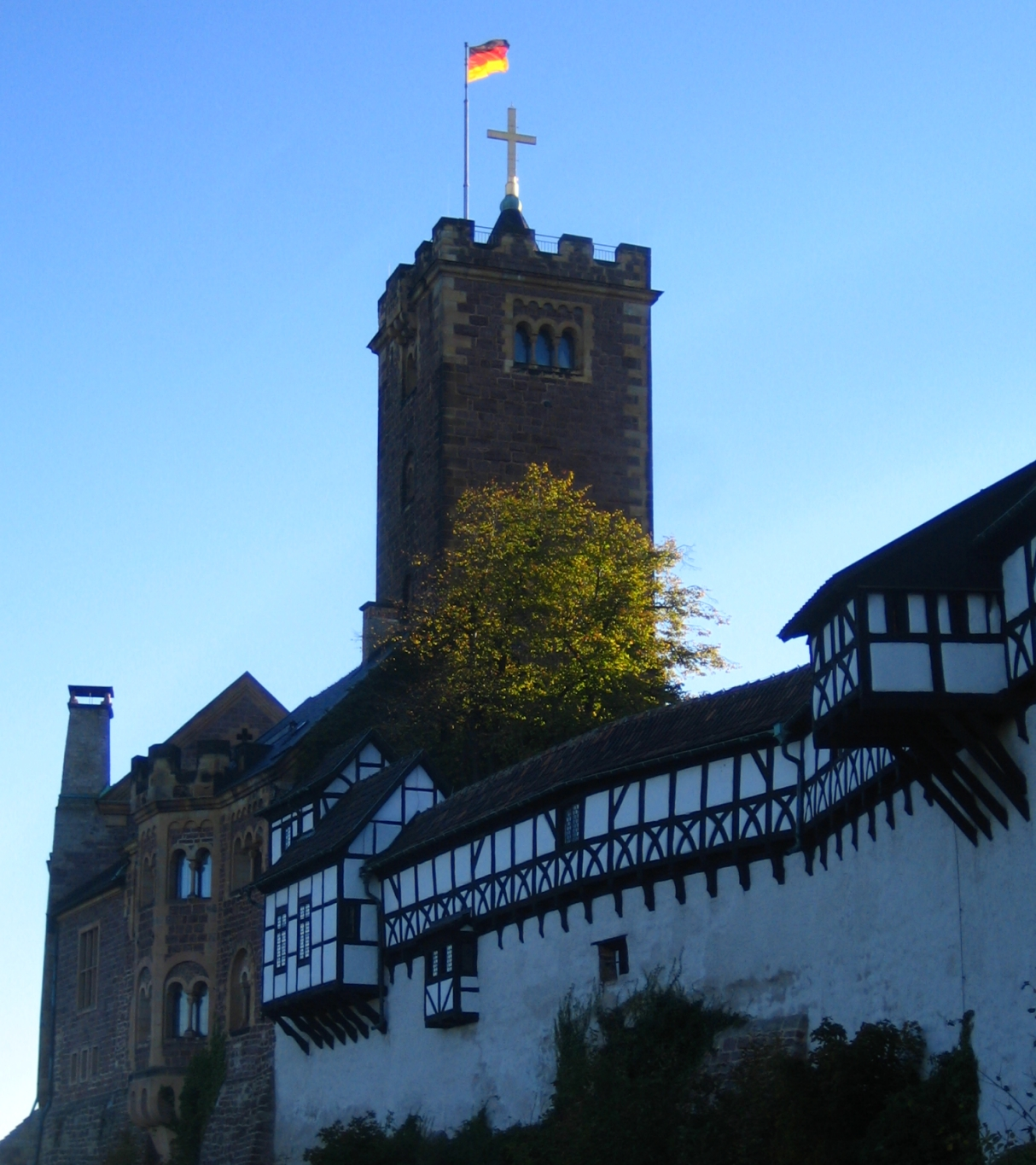 Warburg